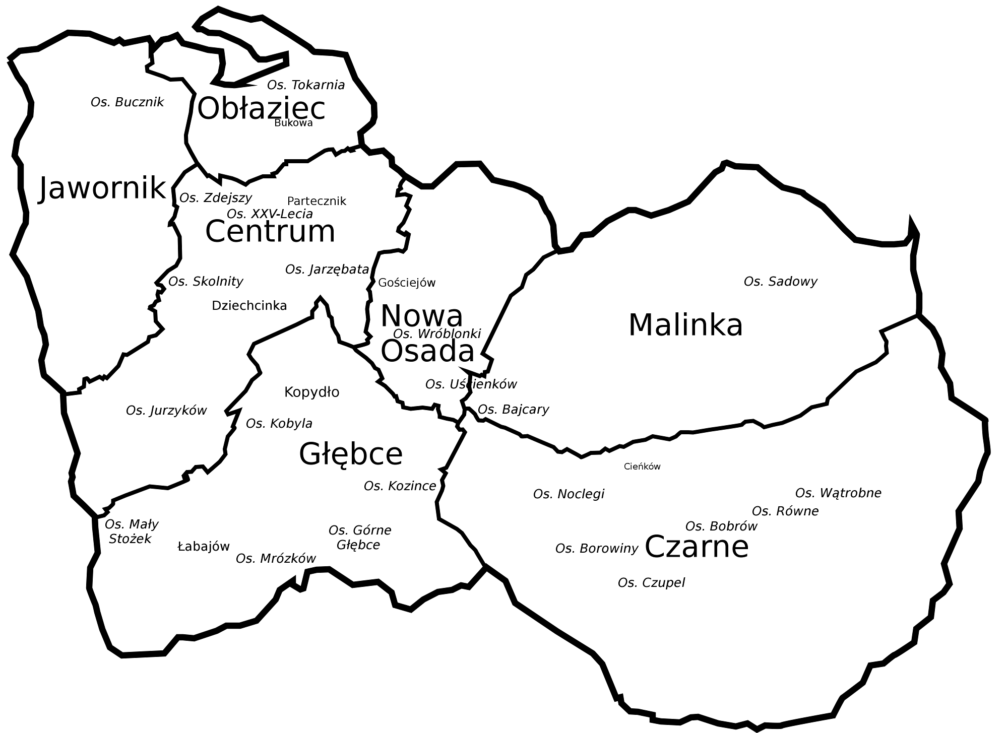 Podział miasta Wisły na jednostki pomocnicze - Osiedla